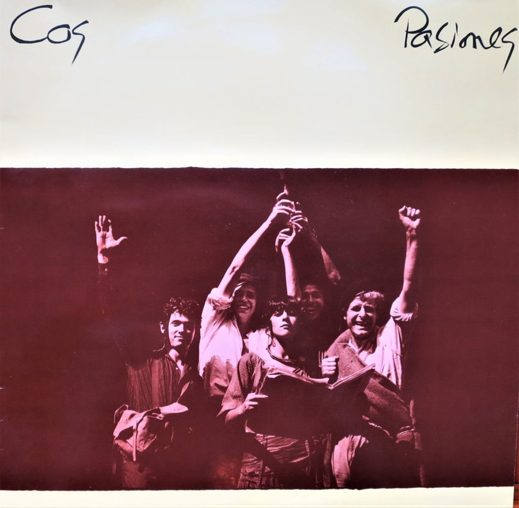 Cos - Pasiones